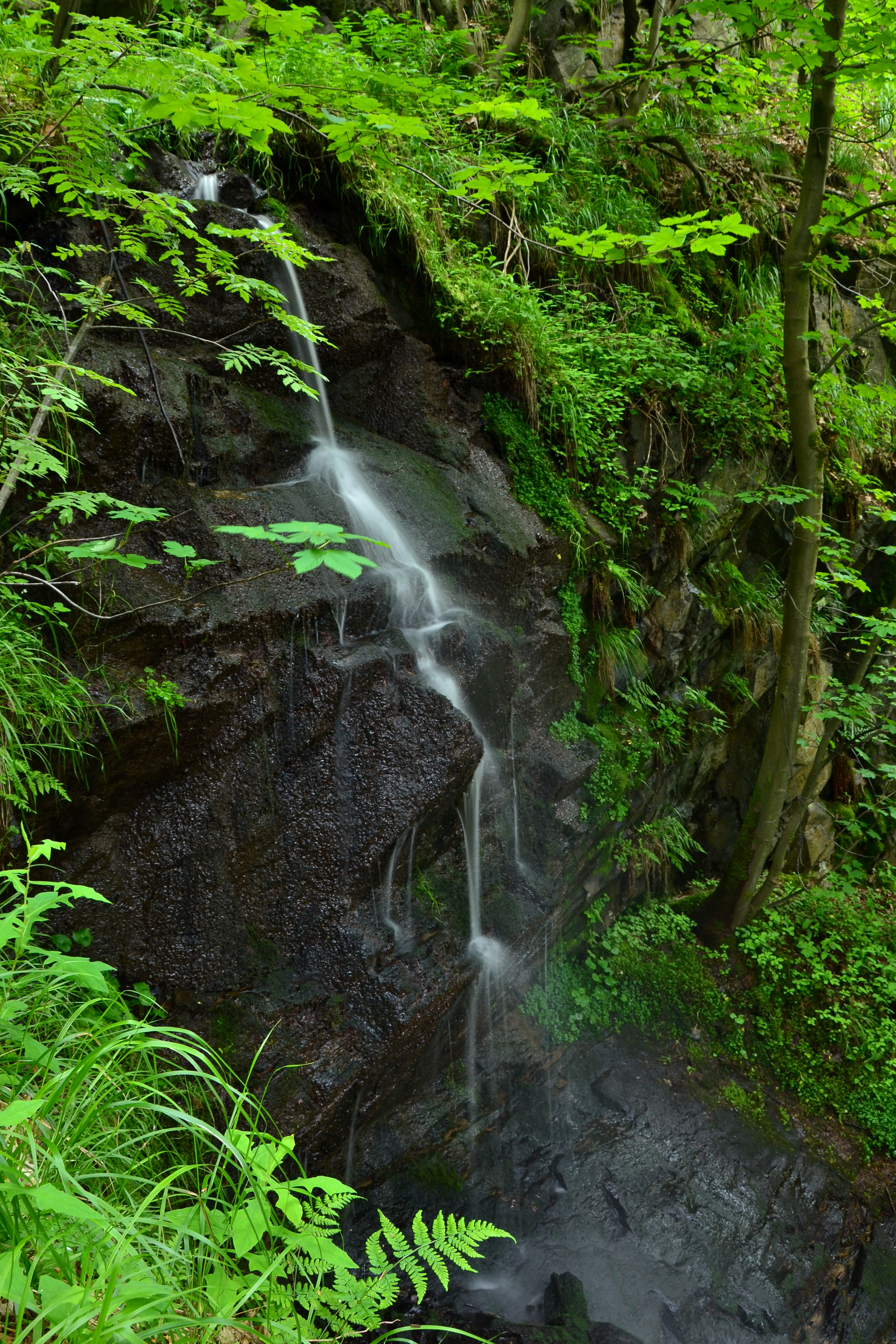 Nejvyšší úroveň Kýšovického vodopádu